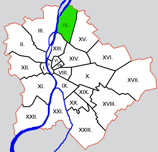 Budapest kerületei: IV. kerület